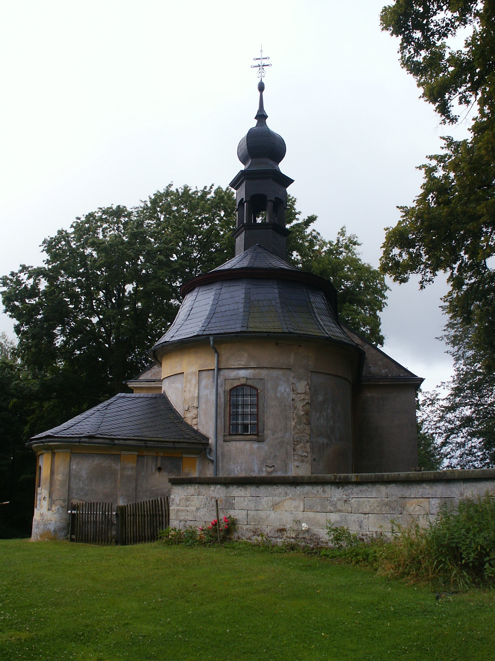 Kostel Panny Marie Sněžné, Sněžná (Krásná Lípa) - pohled od severovýchodu.